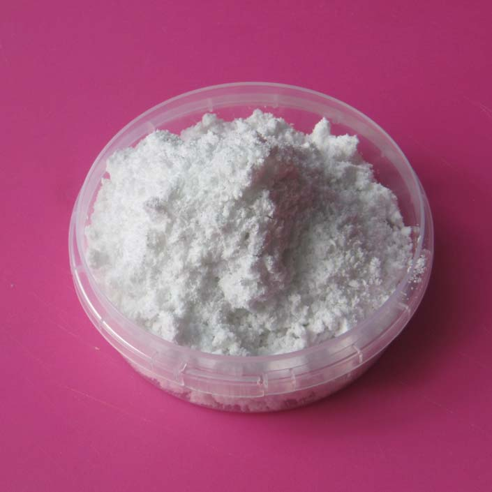 Сульфид стронция в баночке.